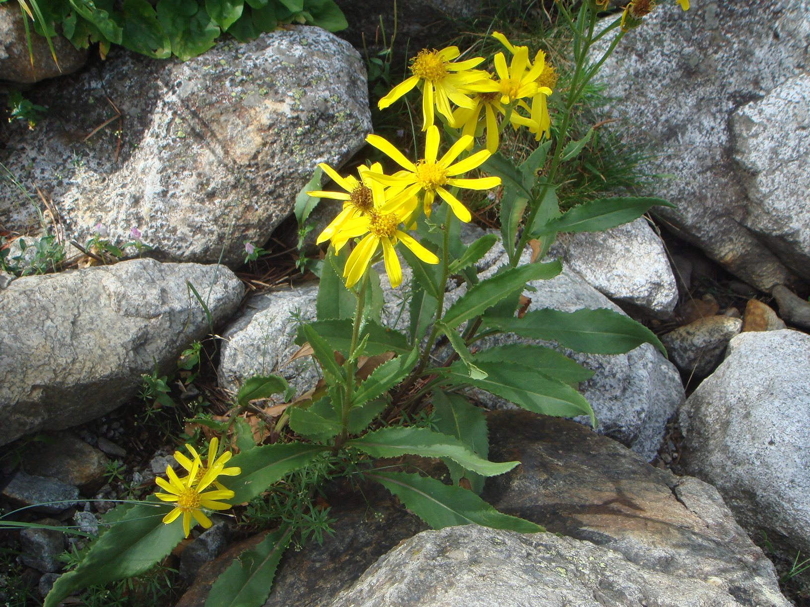 (Senecio pyrenaicus), Valle de Barrosa, Pirineos, Huesca, España.